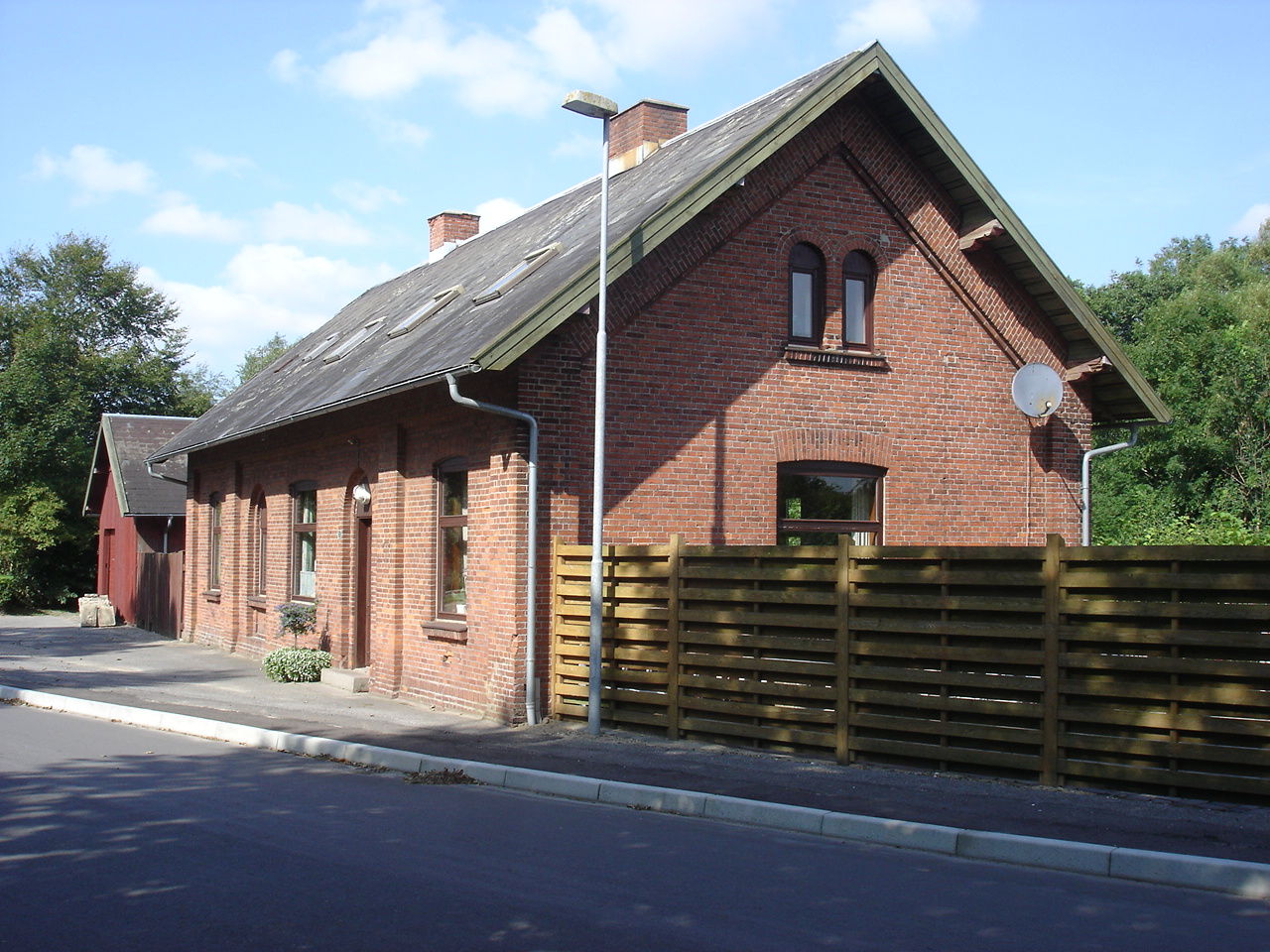 Lyby Station fra S